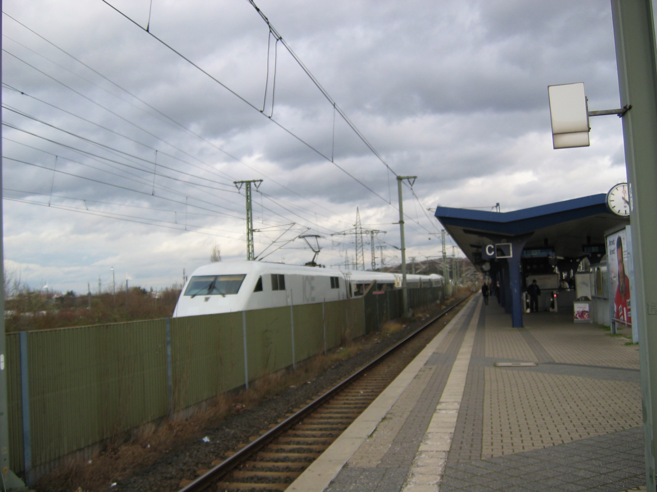 ICE passing the station Offenbach am Main-Ost in direction Frankfurt am Main-Central Station. View to the platform 3 / ICE fährt über den Bahnhof Offenbach-Ost in Richtung Frankfurt am Main-Hbf, Blick zum Gleis 3